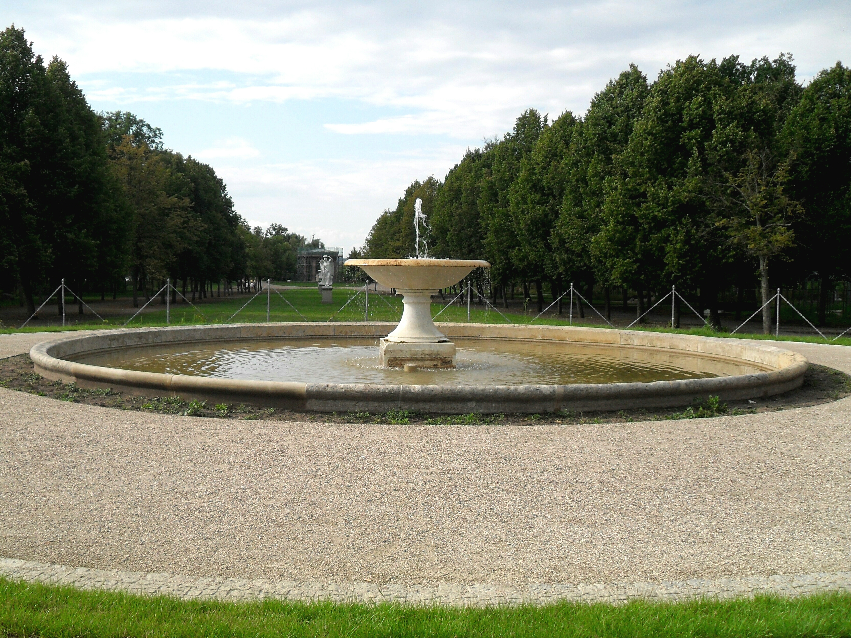 Blick auf einen der drei Marmorspringbrunnen im Schlosspark Neustrelitz